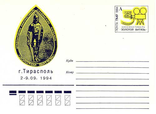 III Международный кинофестиваль славянских и православных фильмов «Золотой Витязь»